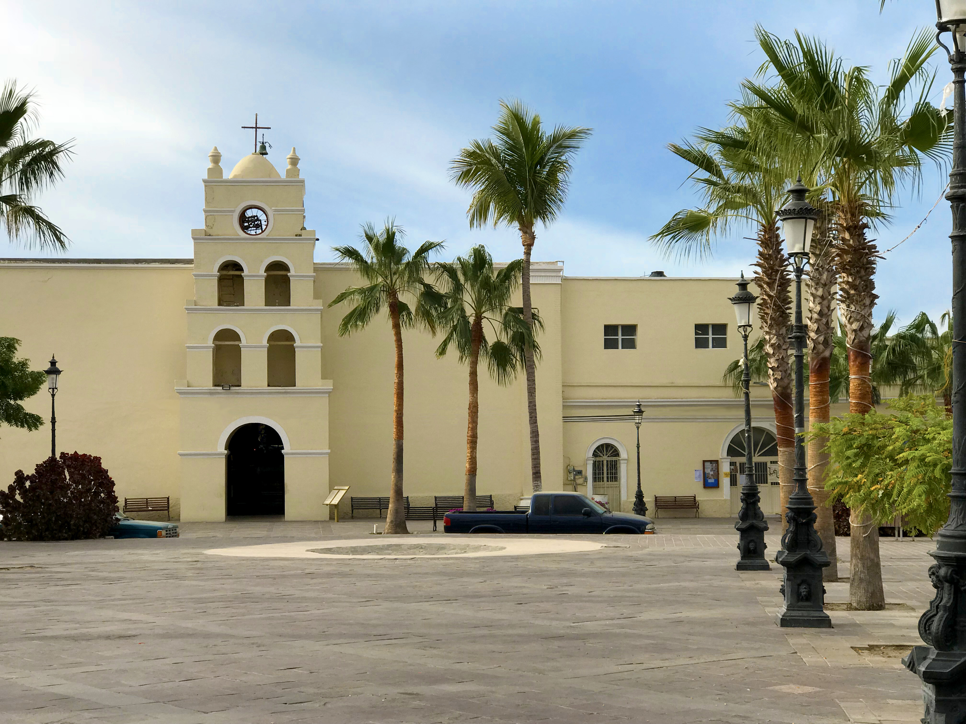 iglesia misión todos santos